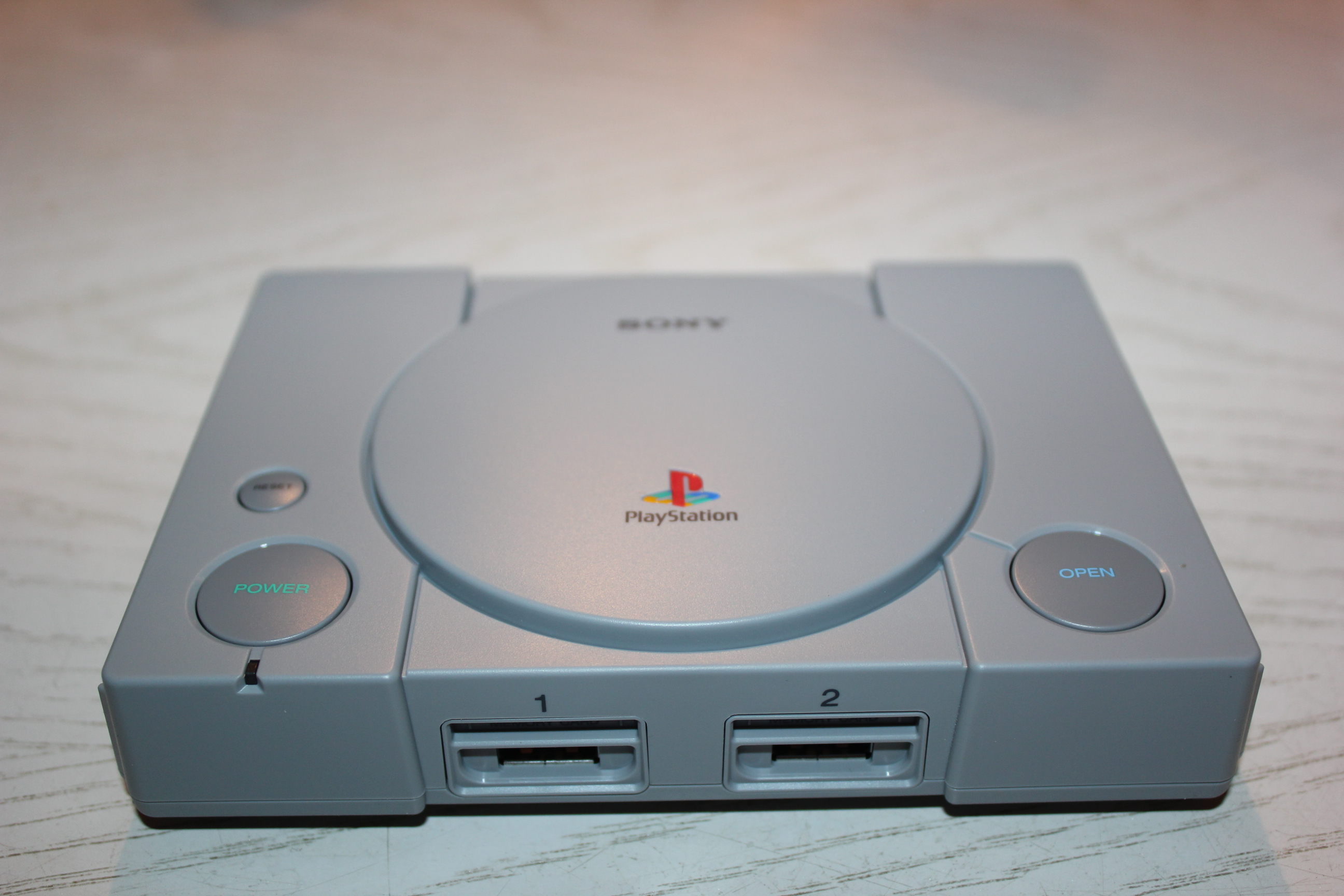 PlayStation Classic Konsole Vorderseite